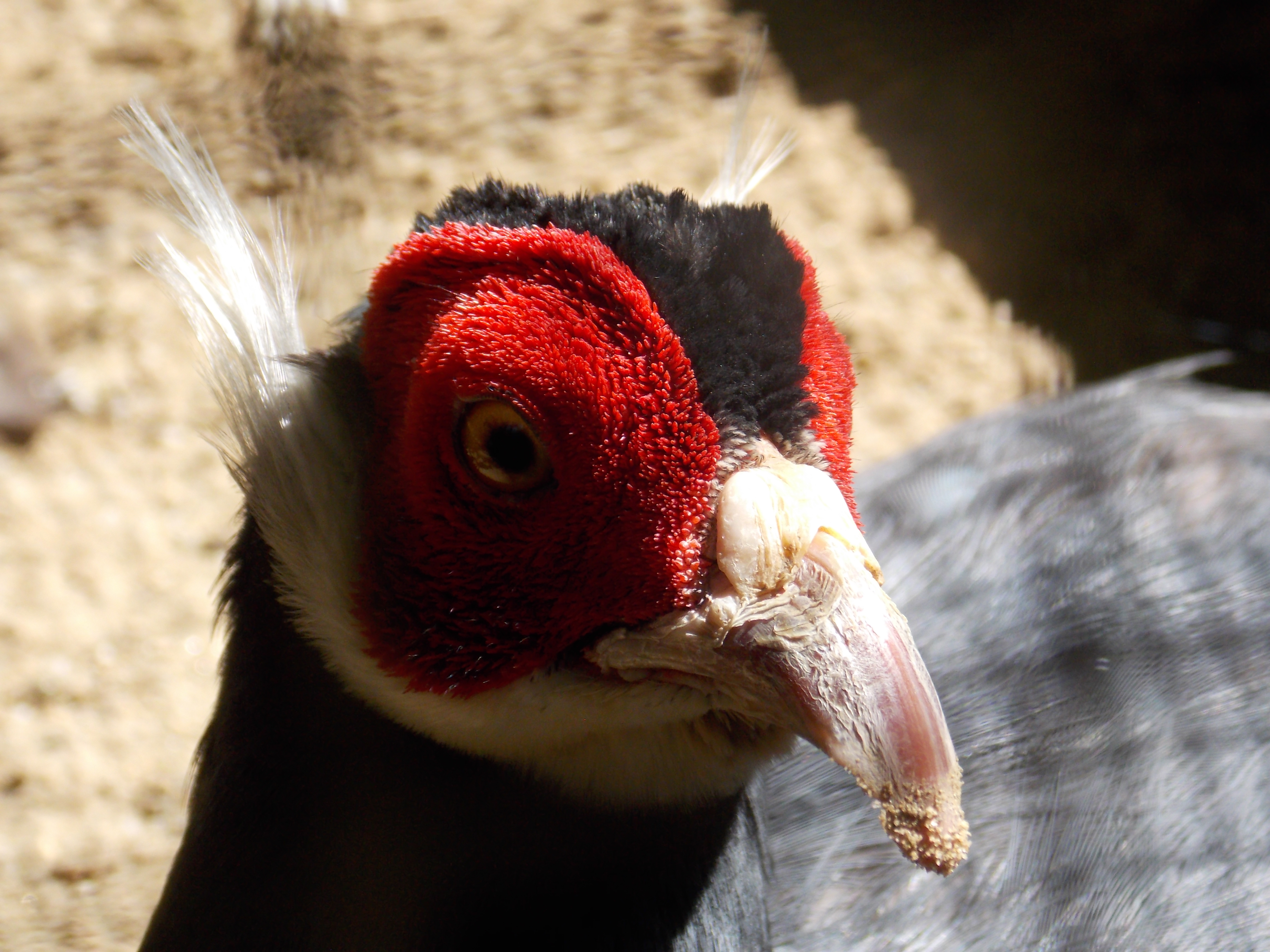 ohrfasan